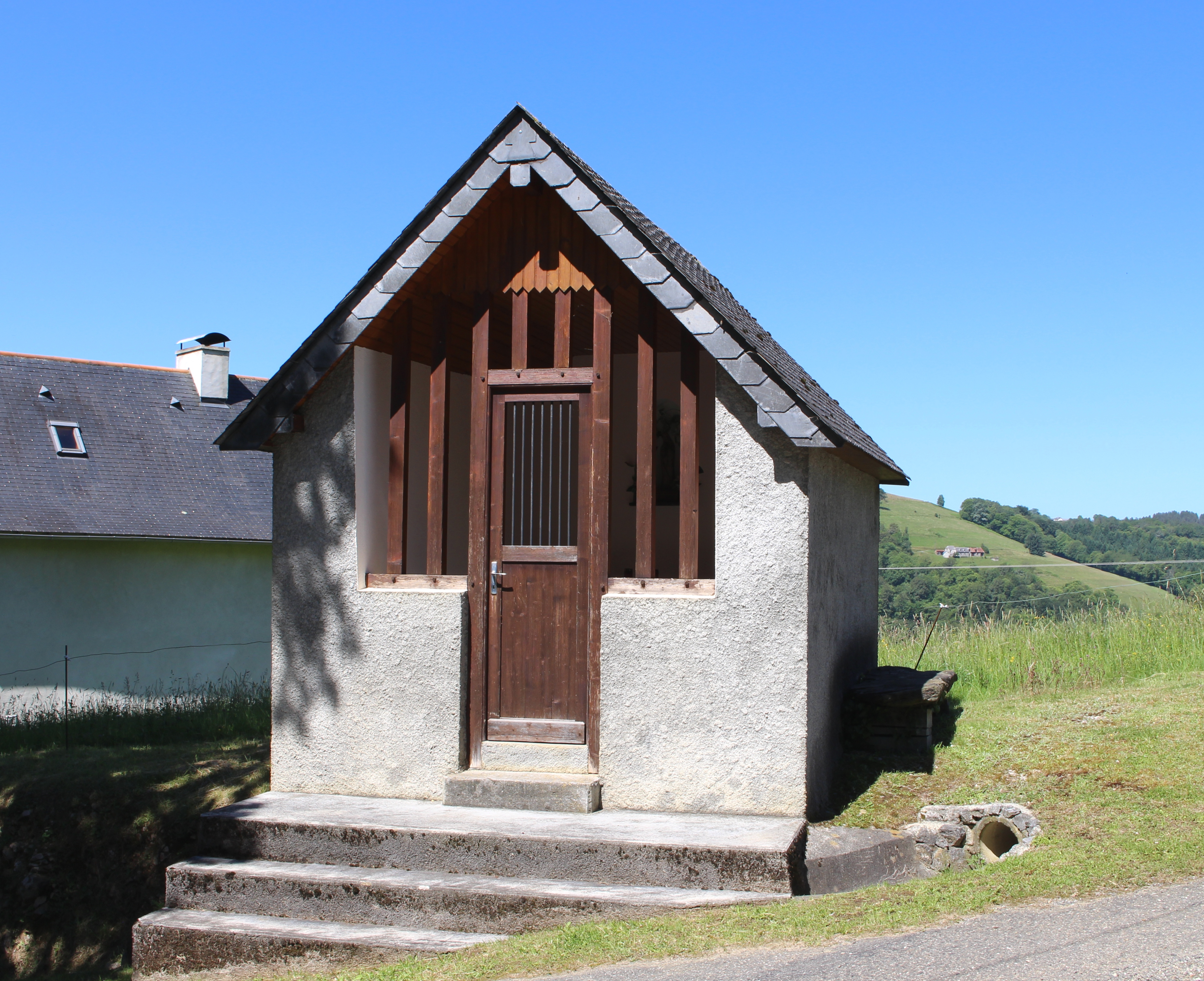 Oratoire de Lies (Hautes-Pyrénées)